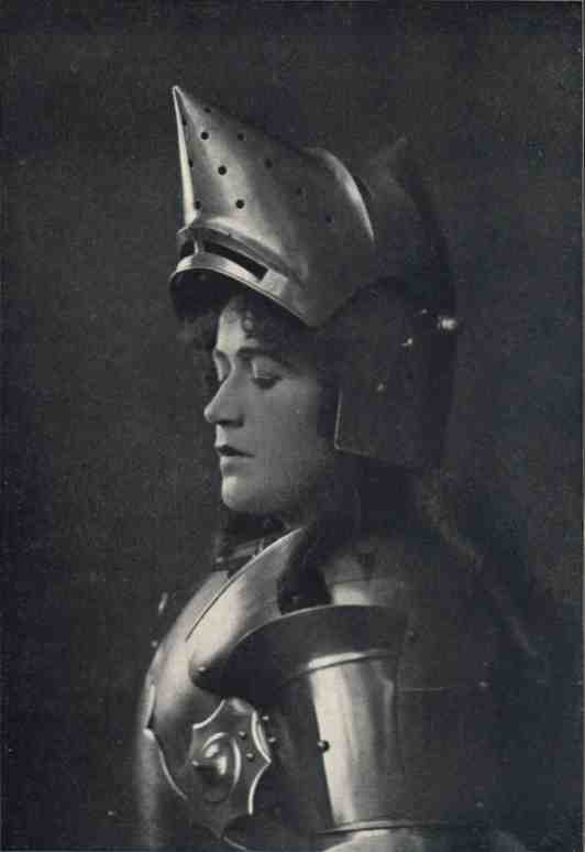 Emmy Remolt-Jessen als Johanna in Friedrich Schillers „Jungfrau von Orleans“, 1904.